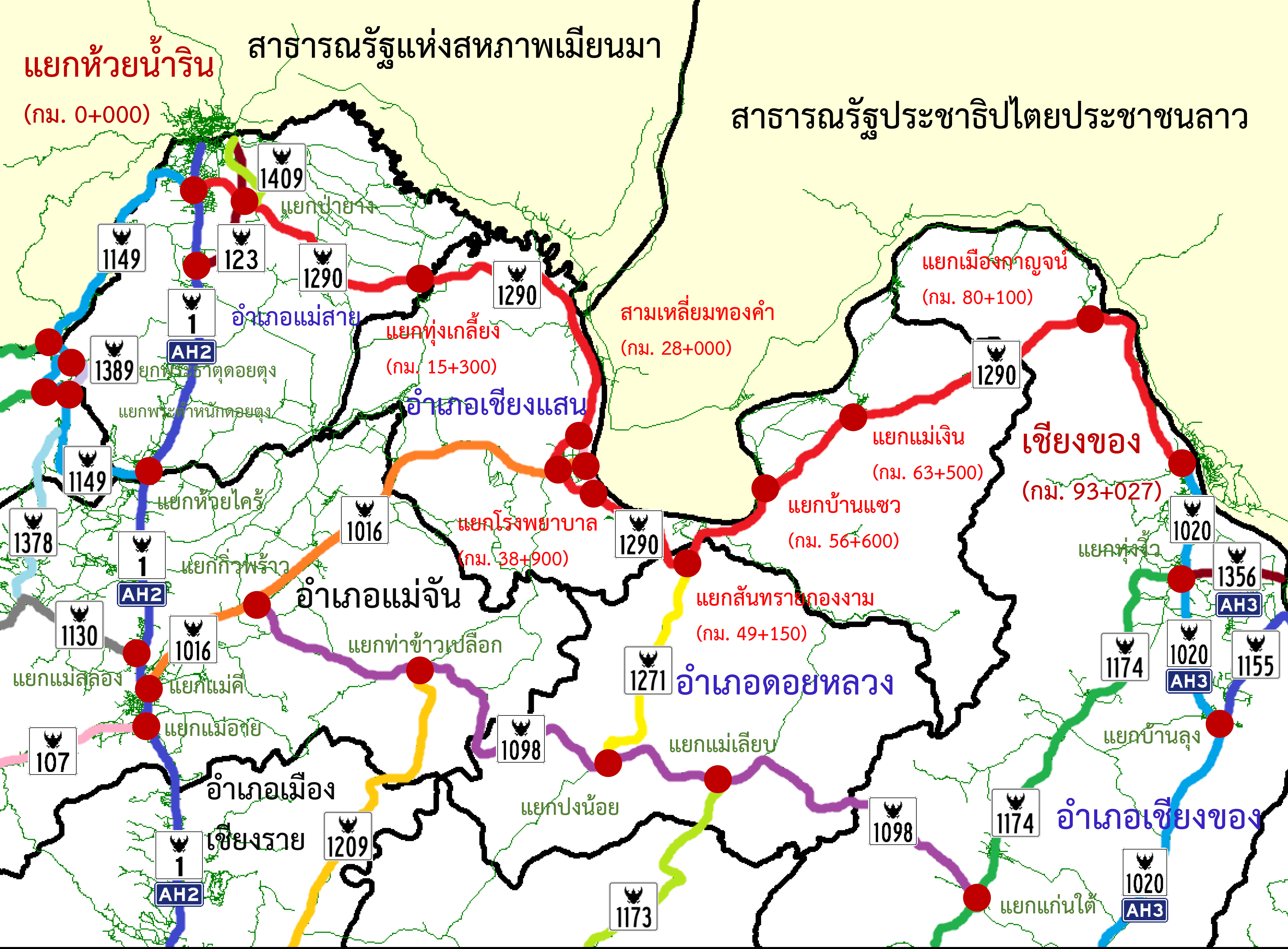 TH HW 1290 map 2